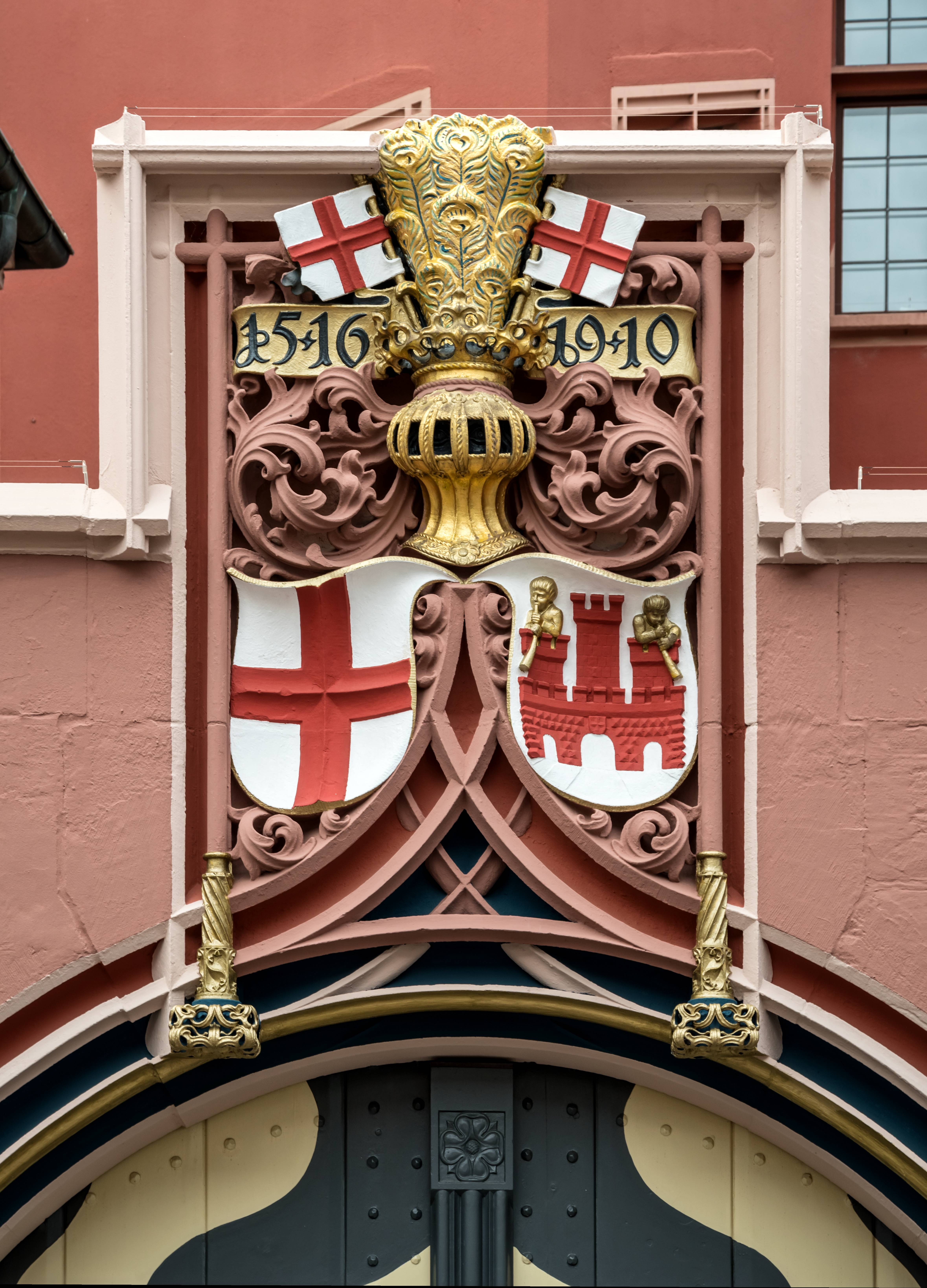 Bilder aus Freiburg im Breisgau Tafel auf der Rückseite des Hauses zum Walfisch am Kartoffelmarkt. Nach der Renovierung